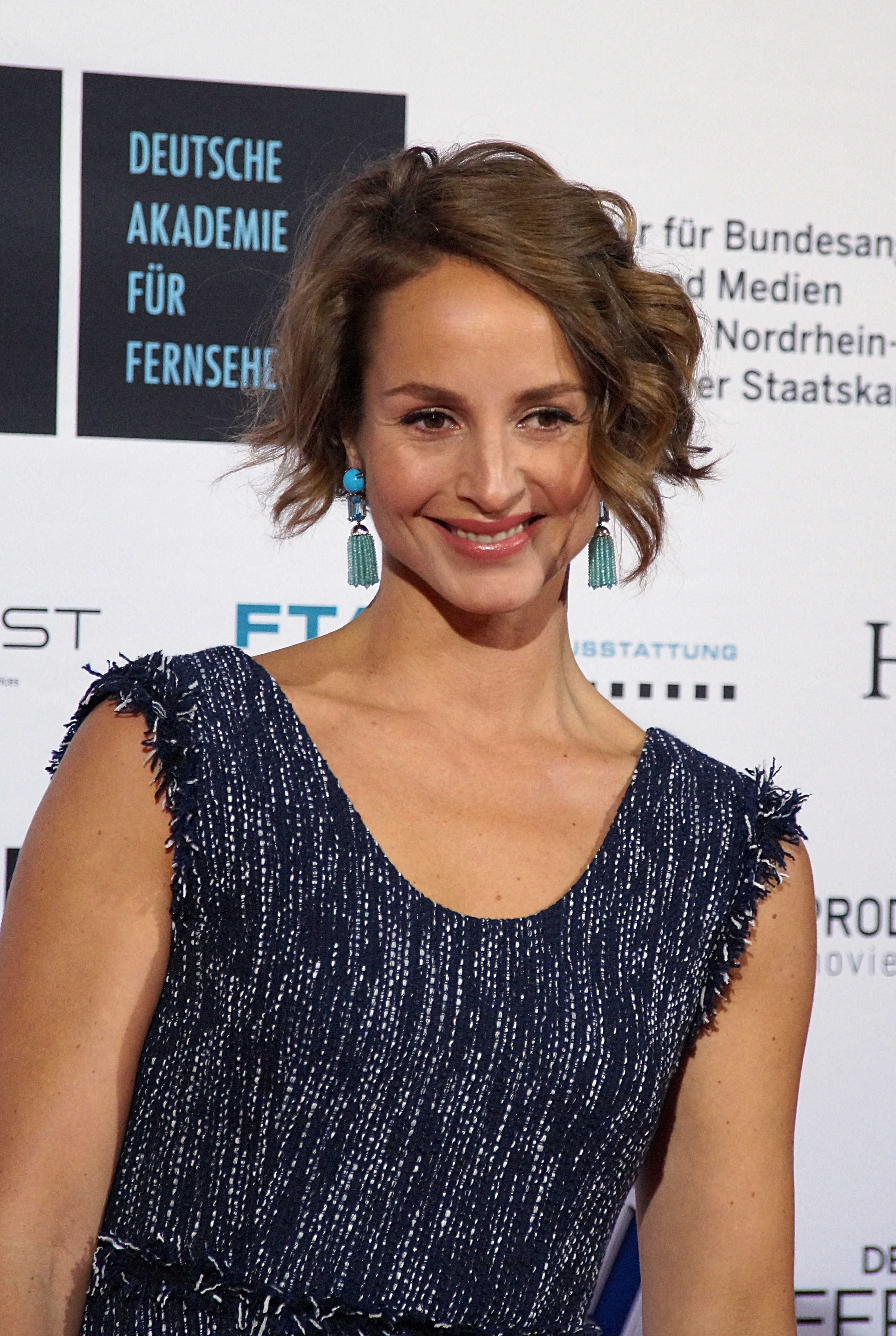 Lara Joy Körner bei der Verleihung zur Auszeichnung 2015, durch die Deutsche Akademie für Fernsehen, im November 2015.